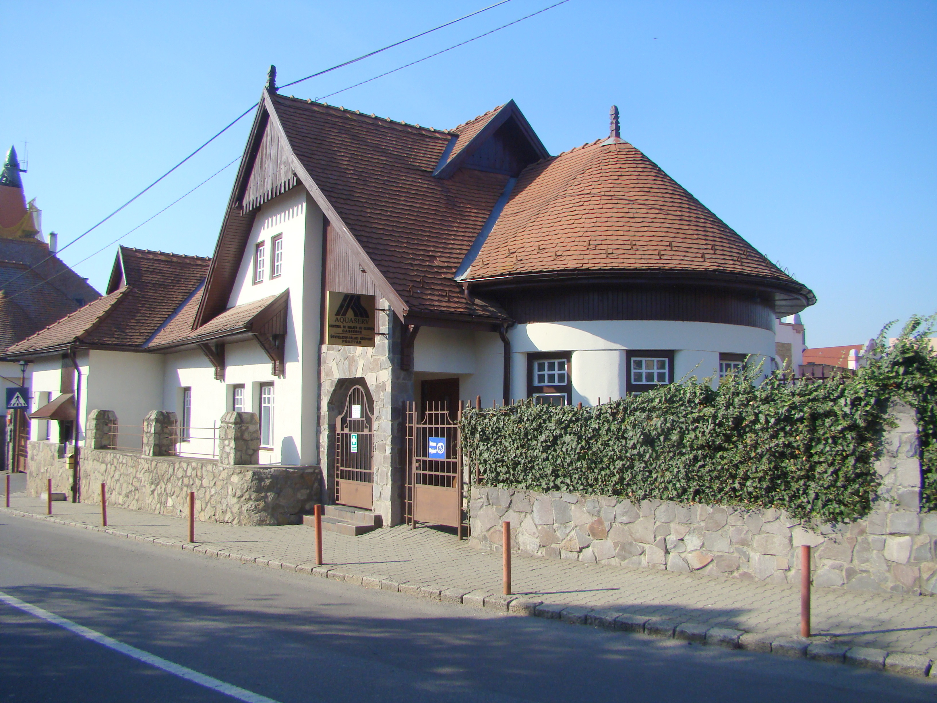 Fostul ansamblu al administrației Uzinelor Comunale, azi R. A. Aquaserv și S.C. Energomur S.A., municipiul Târgu Mureș Str. Kos Karoly 1A și 1 B 1910 - 1913